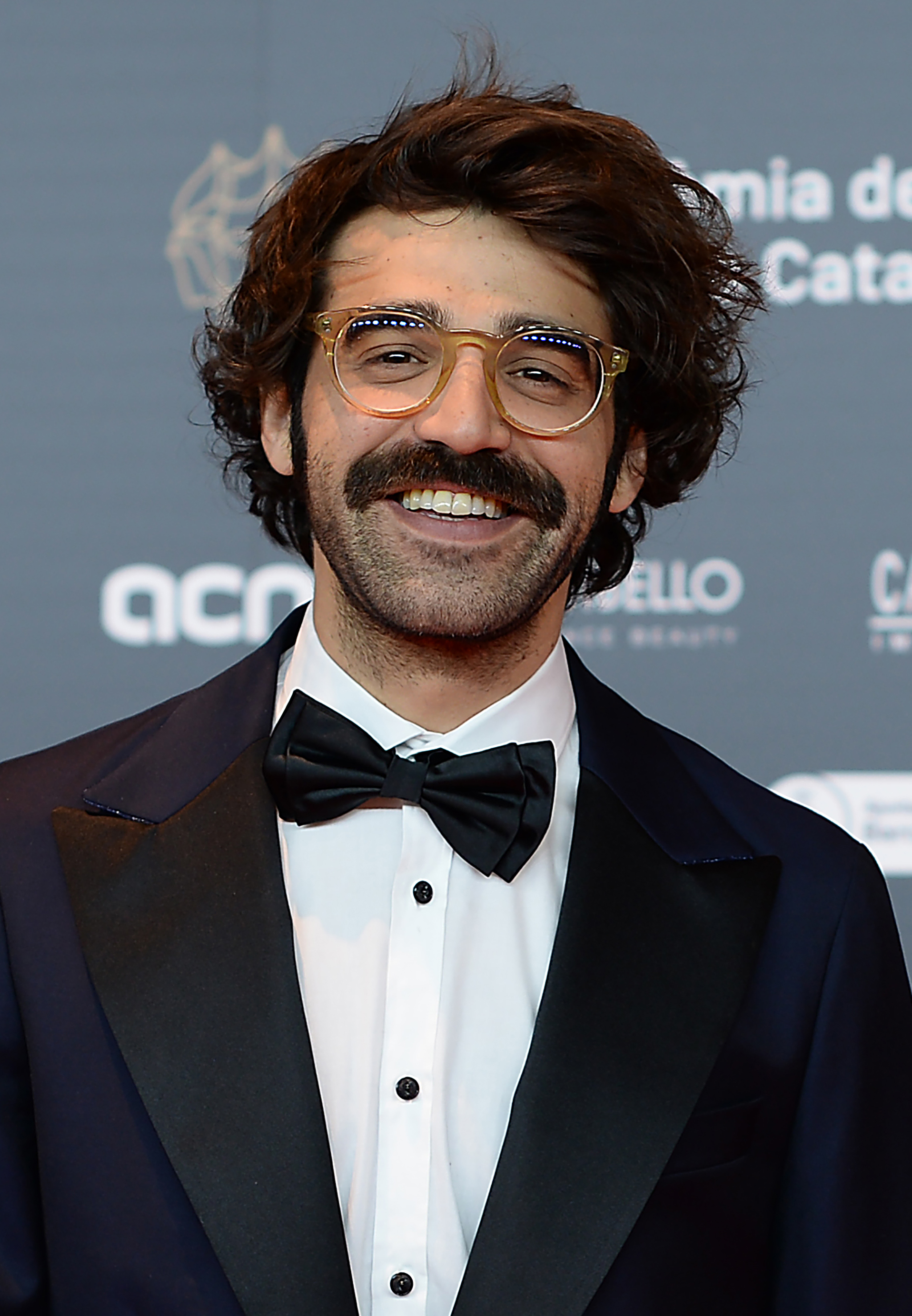 David Verdaguer, actor, XII Premis Gaudí (2020)